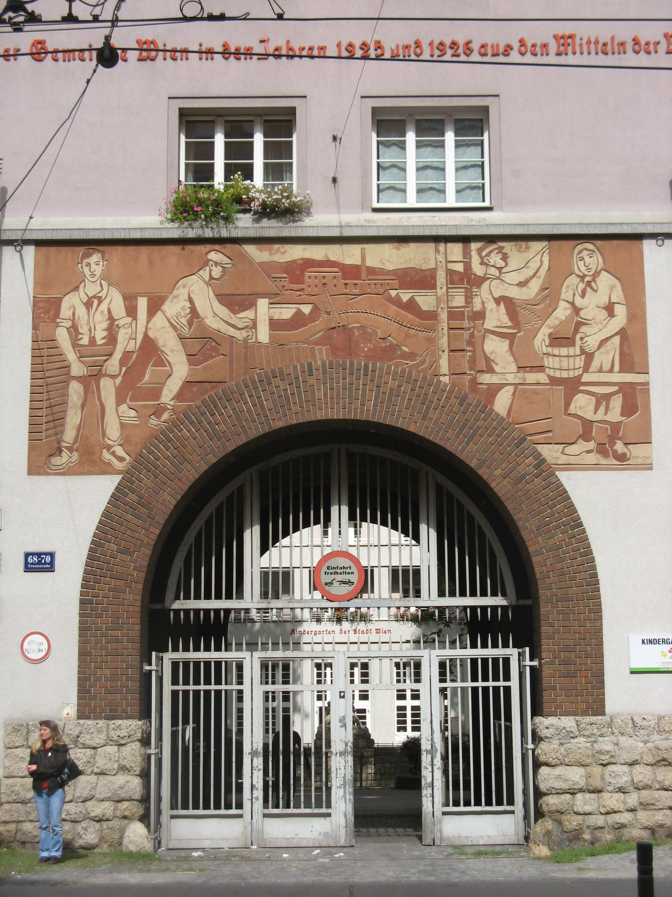 Ziegelarbeiter (1953) von Heribert Potuznik, Pernerstorferhof, Troststraße 68-70, Wien-Favoriten